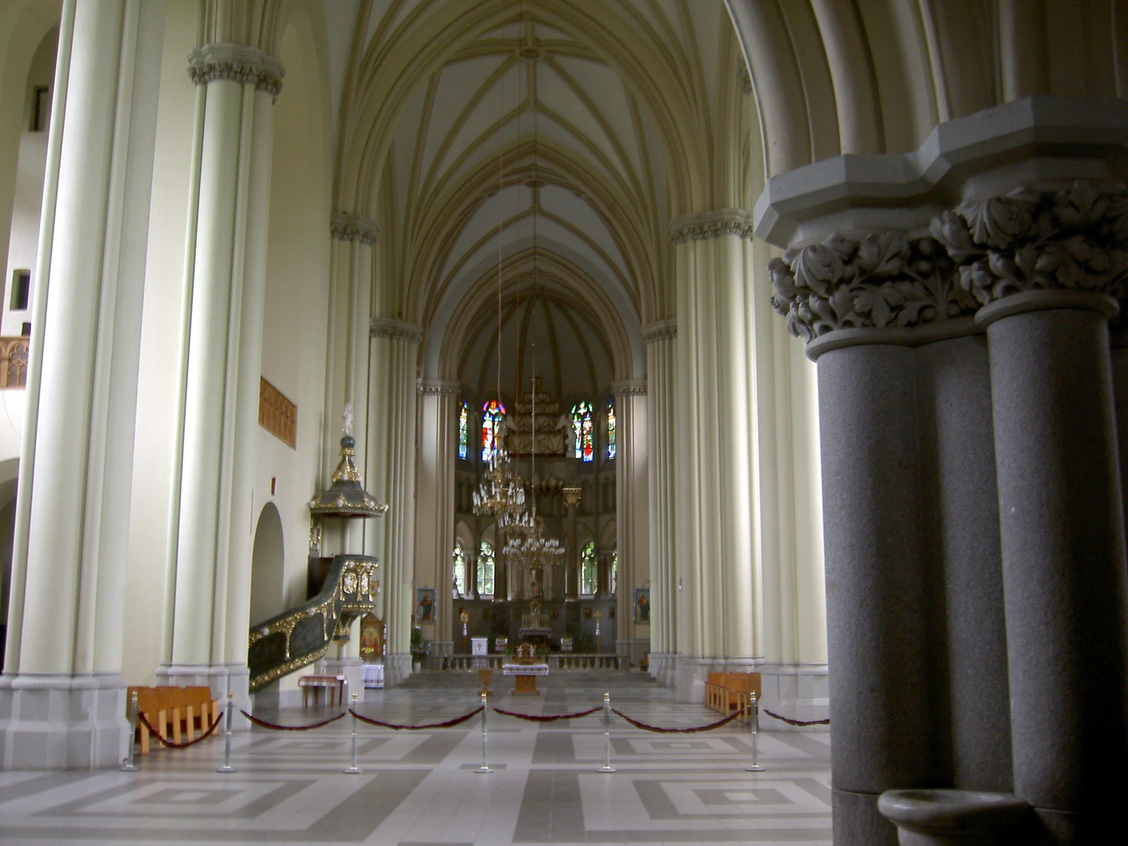 Kostel svaté Olgy a Alžběty ve Lvově